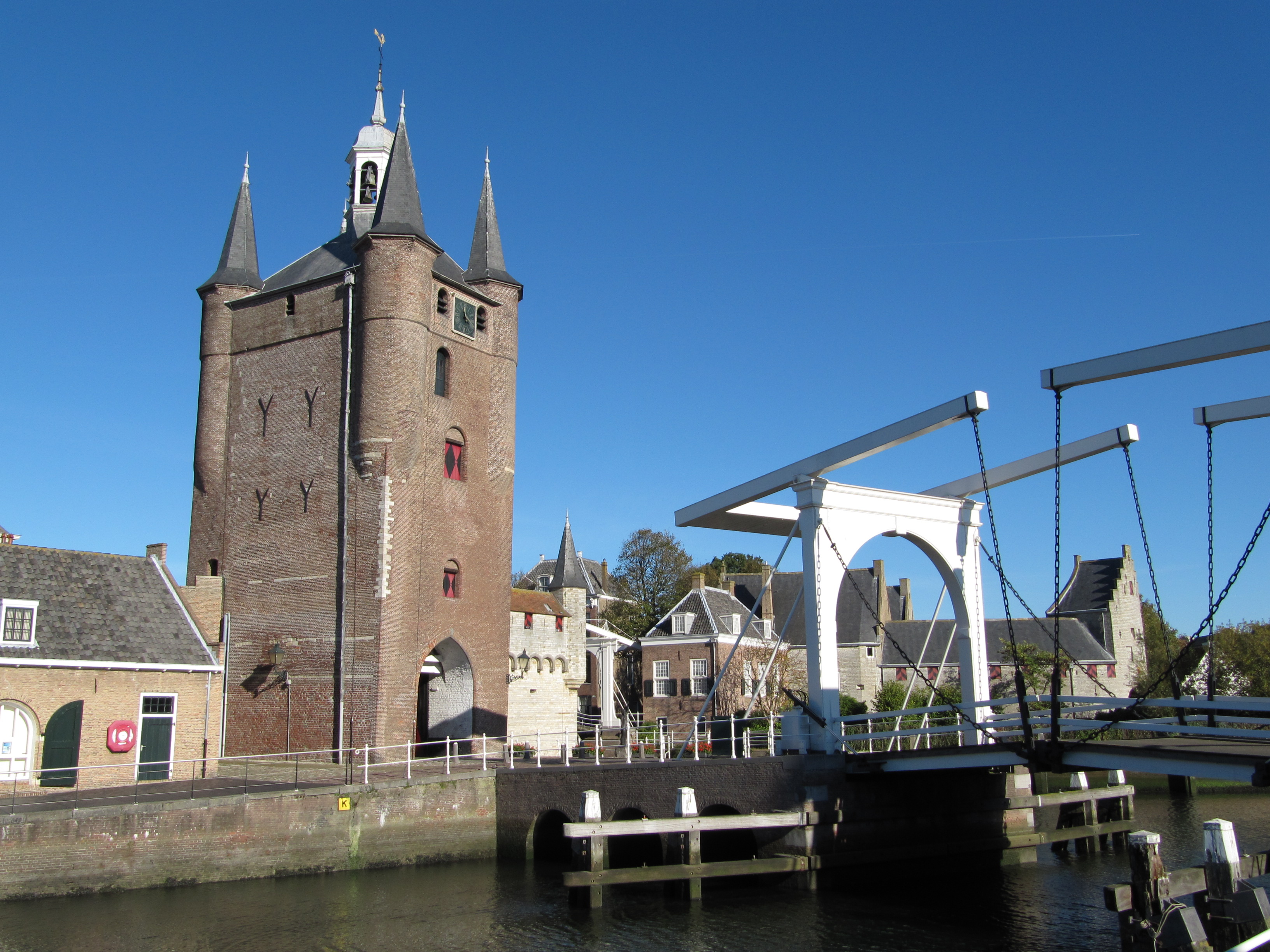 Zierikzee - Zuidhavenpoort en brug.jpg